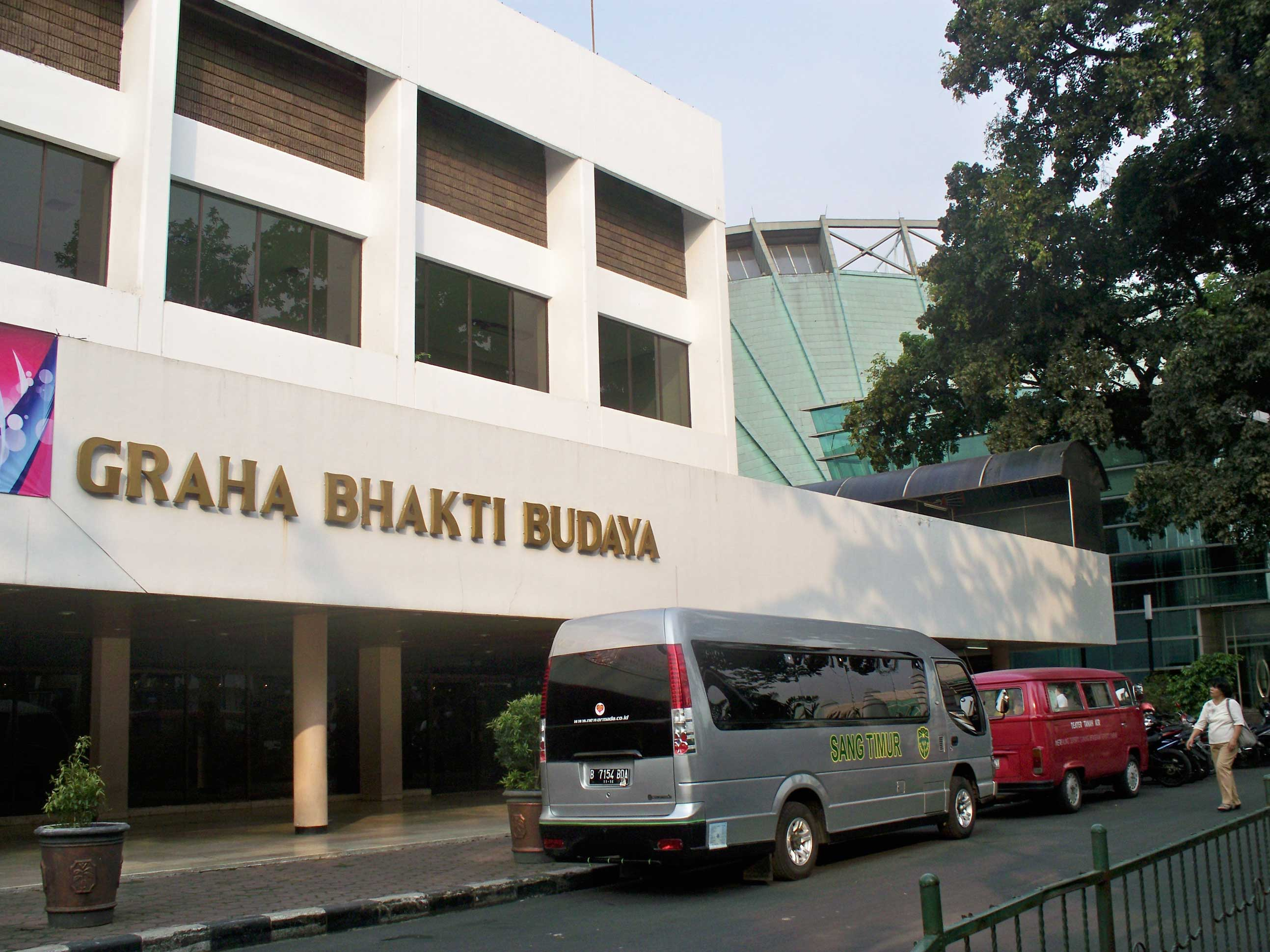 Graha Bhakti Budaya